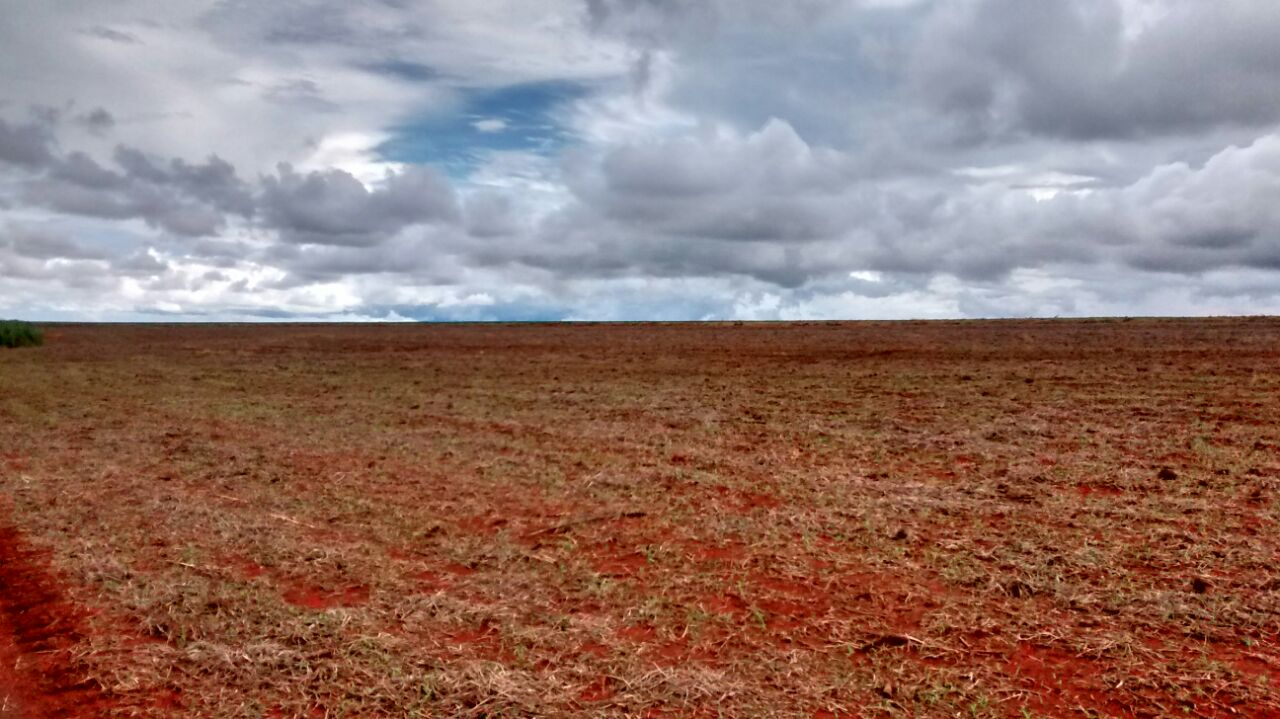 Terras Brasil lavouras